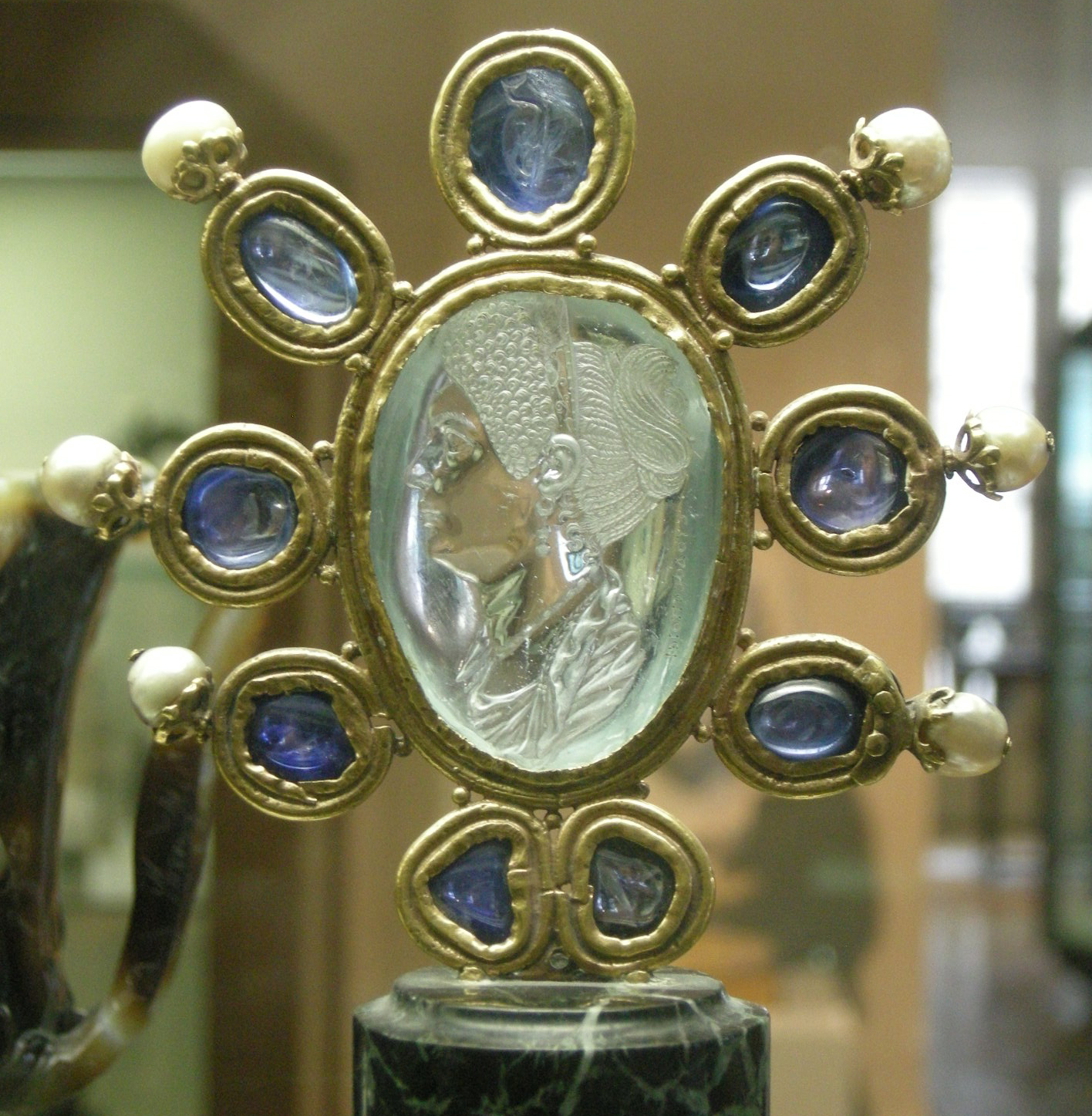 Medieval Intaglio (9th century CE). — intaglio di giulia, figlia di tito, seconda metà del I secolo dc., acquamarina firmata da Evodos, montatura carolingia.